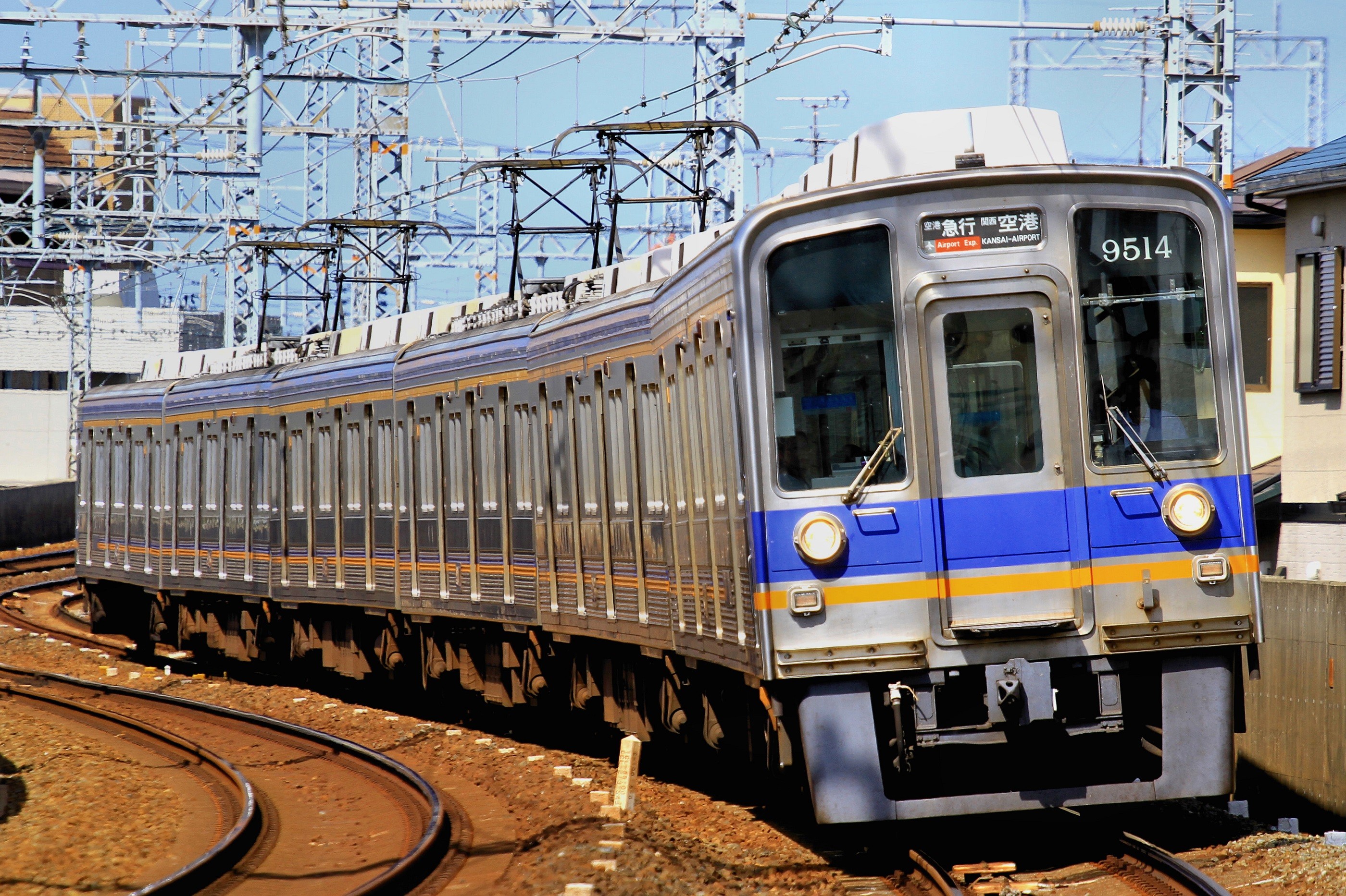 南海9000系電車 6両編成（貝塚～二色浜） Canon EOS 7D